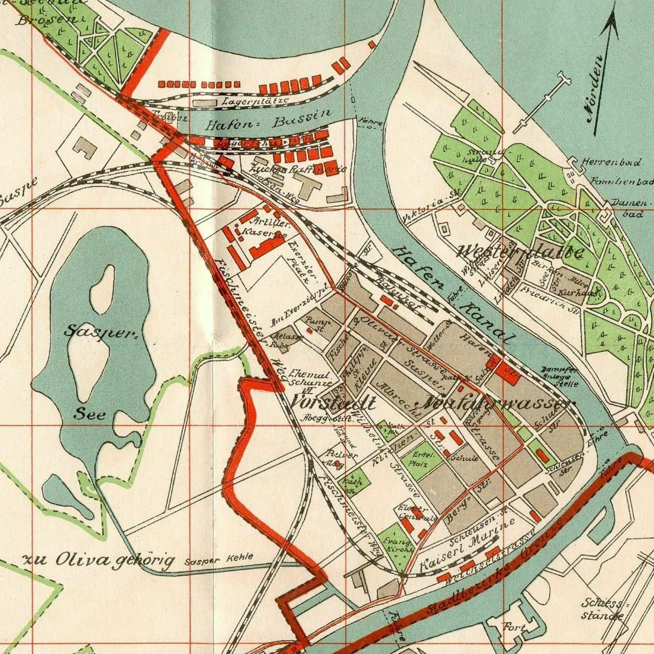 Gdańsk Nowy Port.